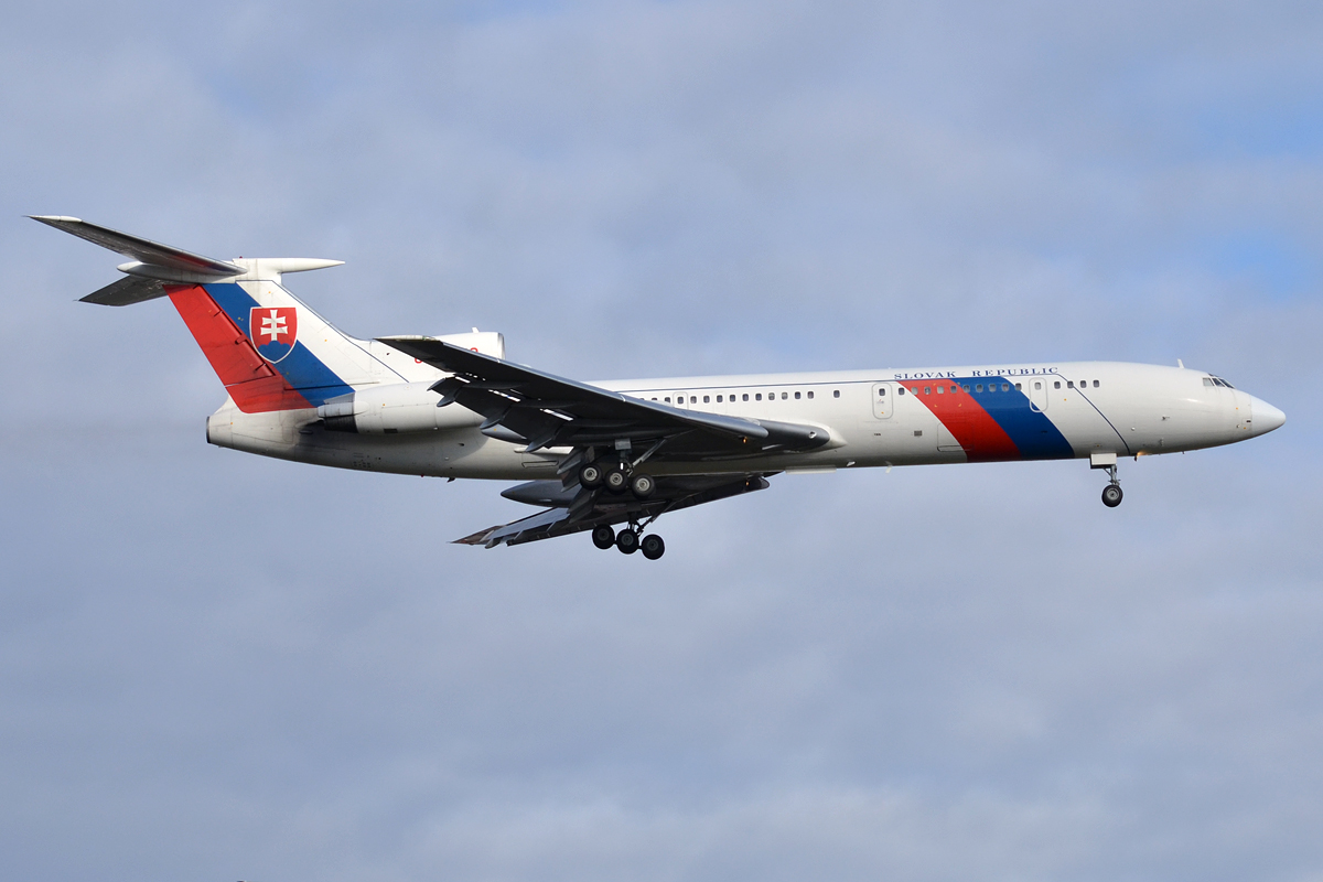 Slovak Government Flying Service, OM-BYO, Tupolev Tu-154M Lux